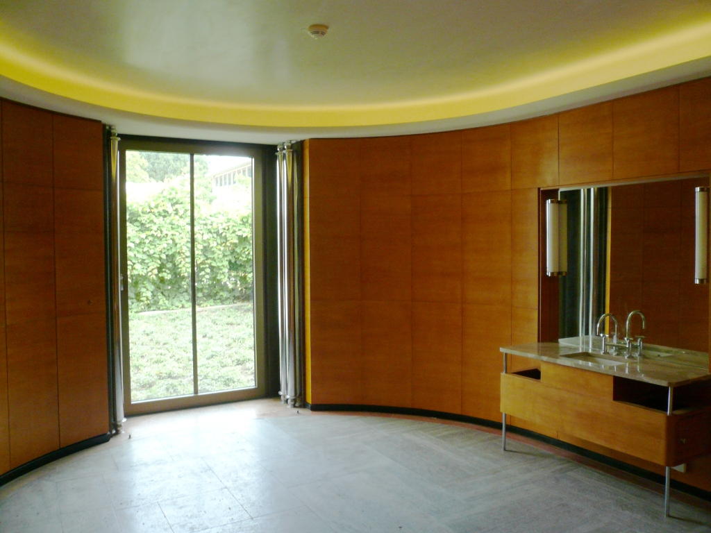 Haus K. in O. -Villa Reemtsma - in Hamburg Othmarschen